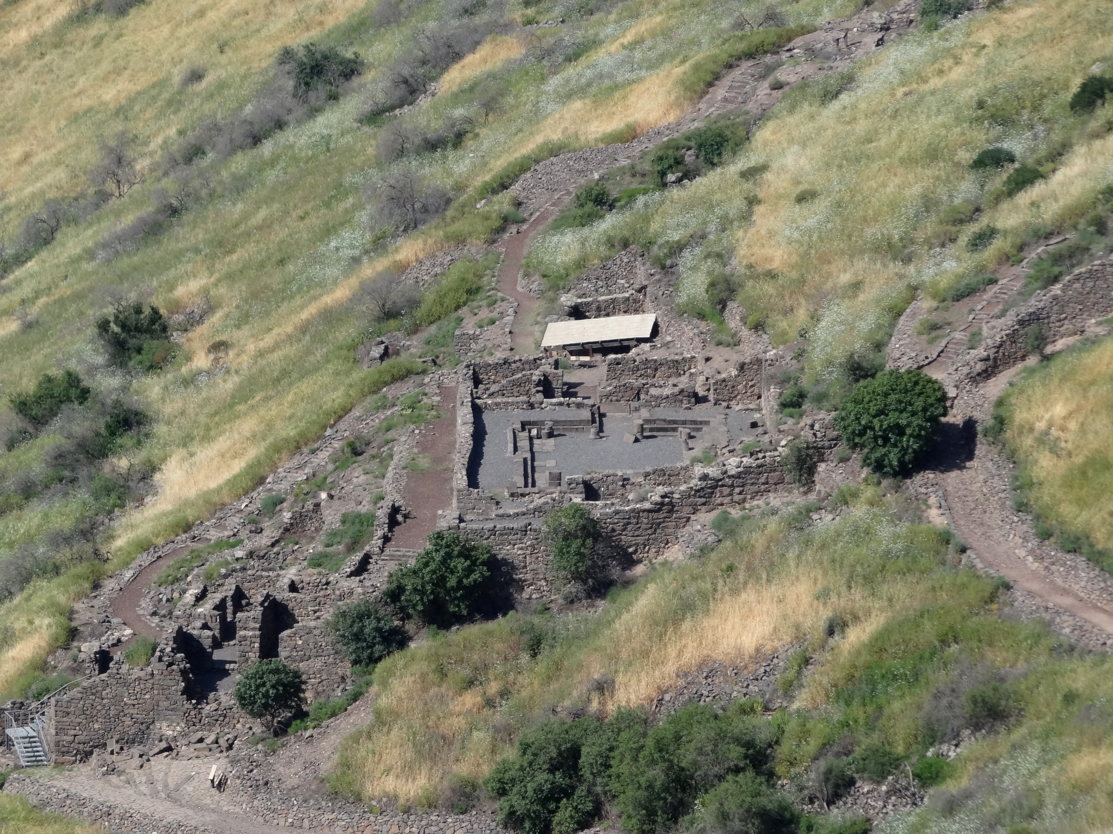 Gamla Synagogue in Golan Heightsת Built during the second Temple Period in the first century CE. This is the one of the most ancient synagogues in Israel בית הכנסת בגמלא, שמקורו כנראה בתקופה ההרודיאנית. זהו ממצא ייחודי שכן היה זה בית הכנסת הראשון מהתקופה ההרודיאנית .